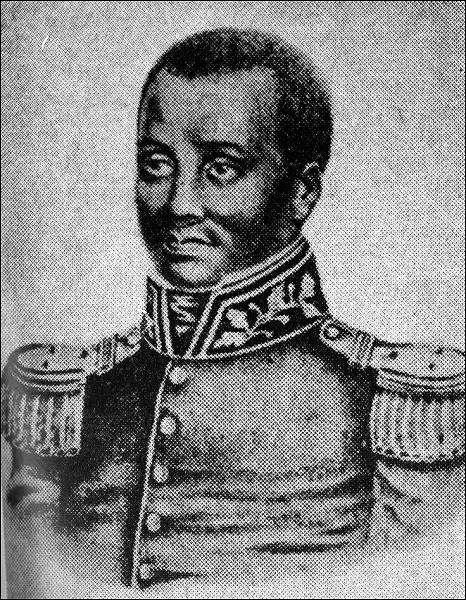 Portrait de l'officier François Capois surnommé Capois-La-Mort.